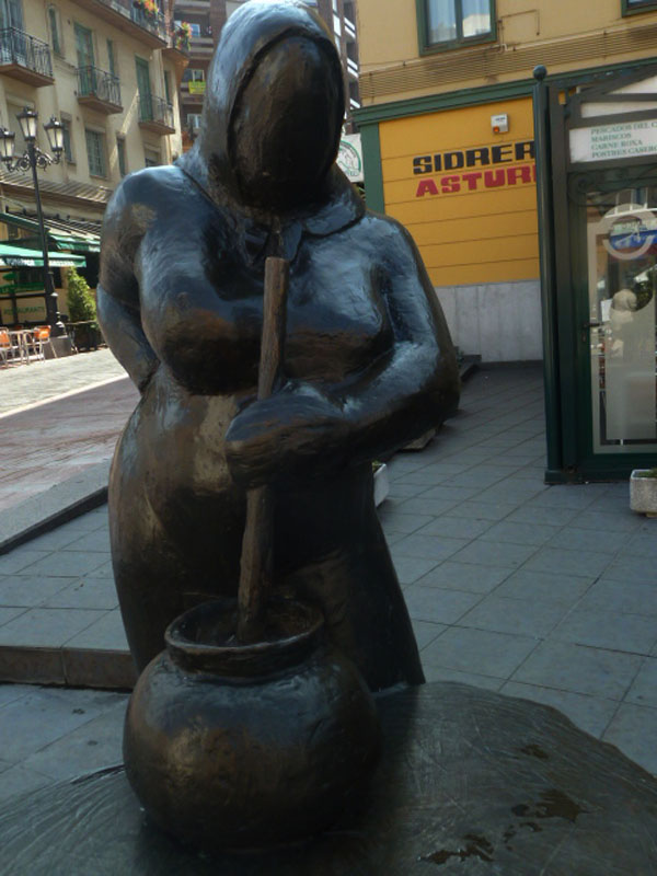 Autora.- María Luisa Sánchez-Ocaña. 2000. Calle La Gascona, Oviedo.